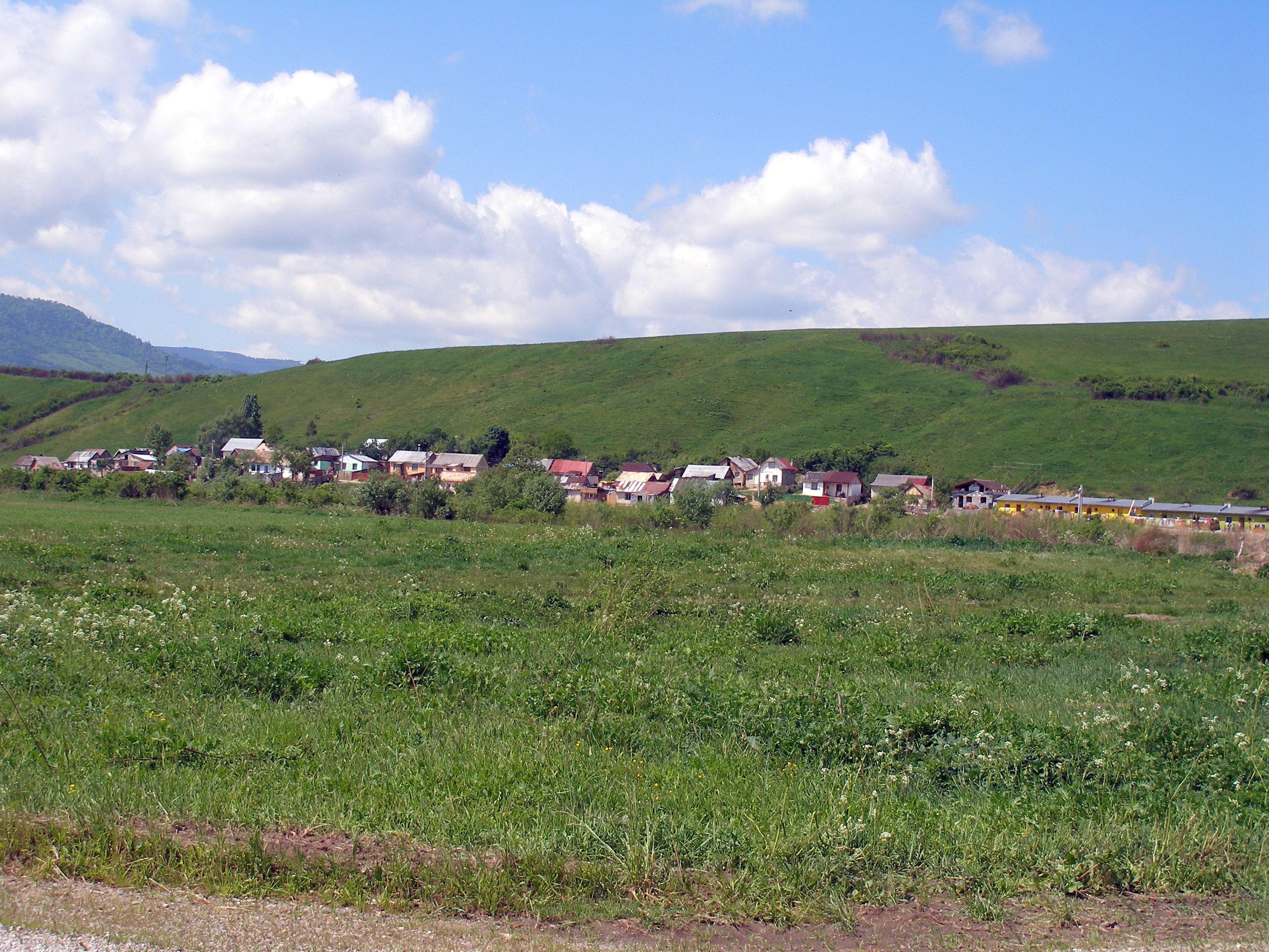 Obec Pečovská Nová Ves okres Sabinov, časť rómska osada